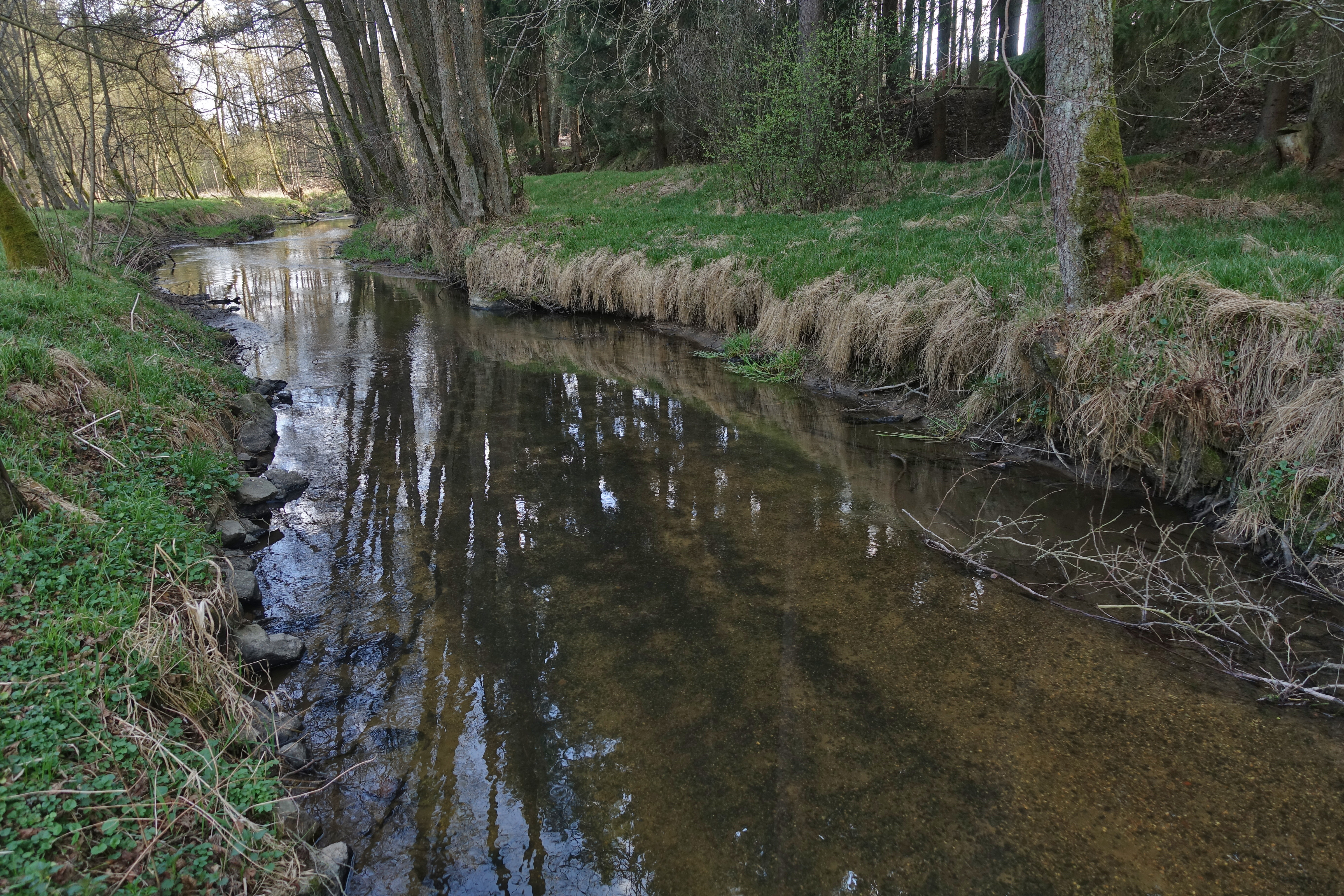 Taxenbach (Fluss) an der Grenze zwischen Tschechien und Österreich